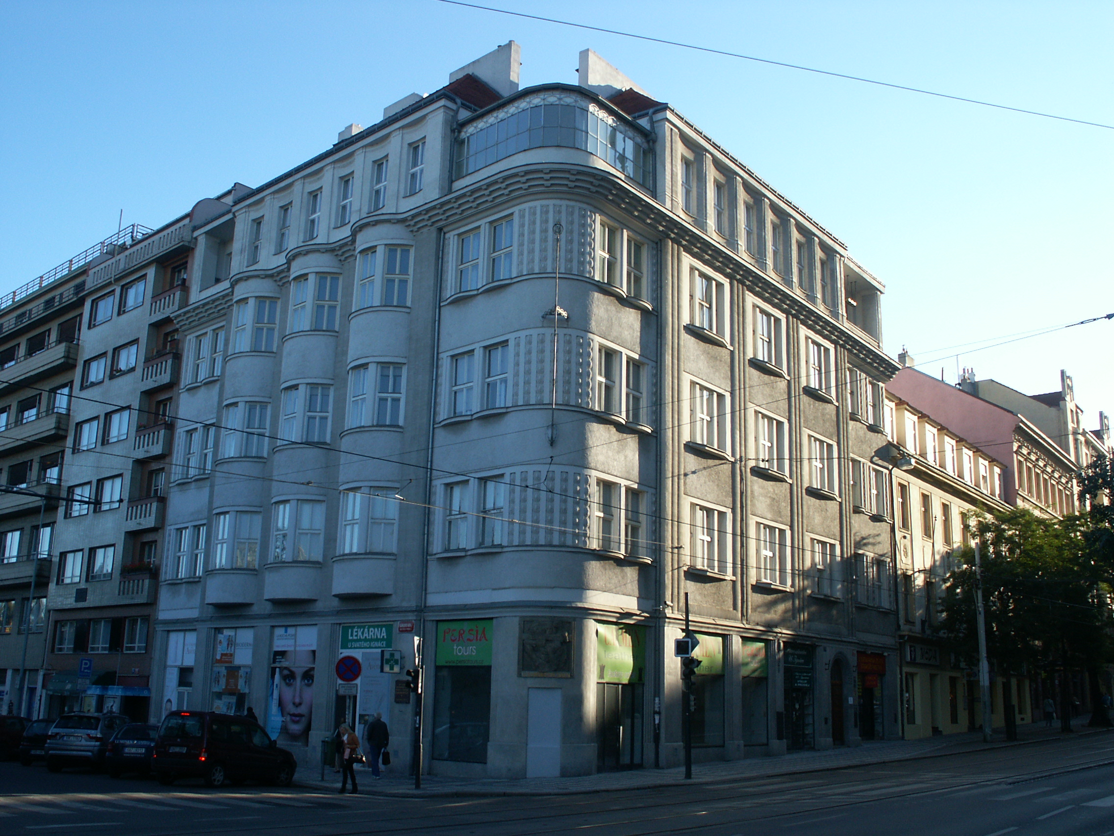 Měšťanský dům U kamenného stolu (Nové Město), Praha 2, Karlovo nám. 550/35, Nové Město